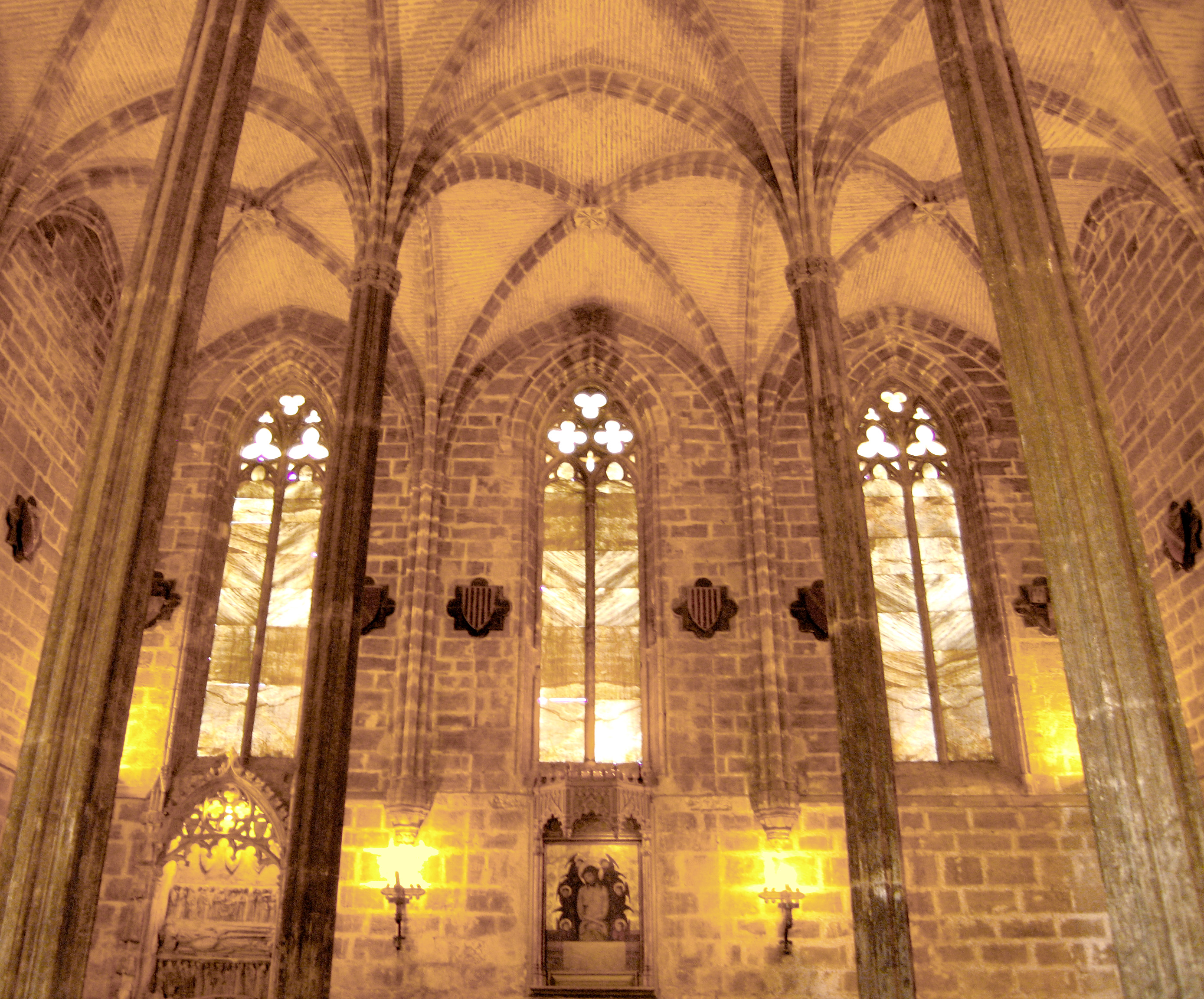 Aula Capitular de sant Domenec (Valencia)